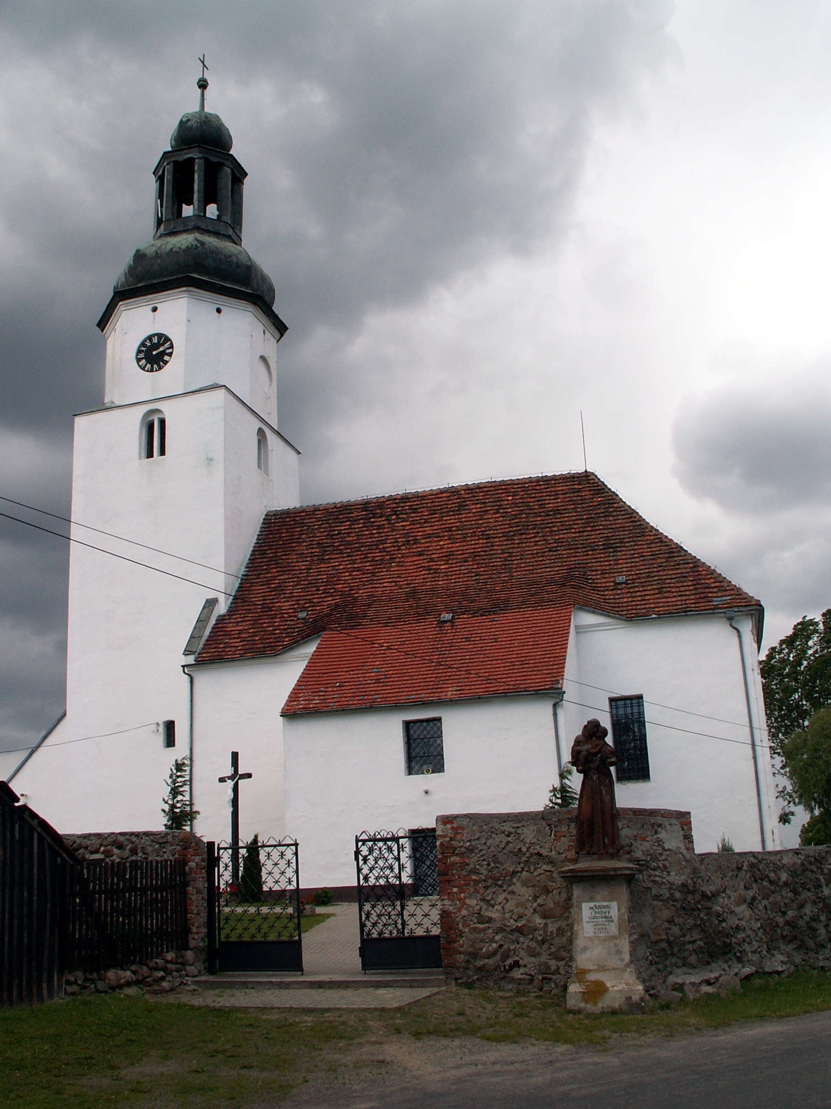 Kościół pw. św. Anny w Broniszowie